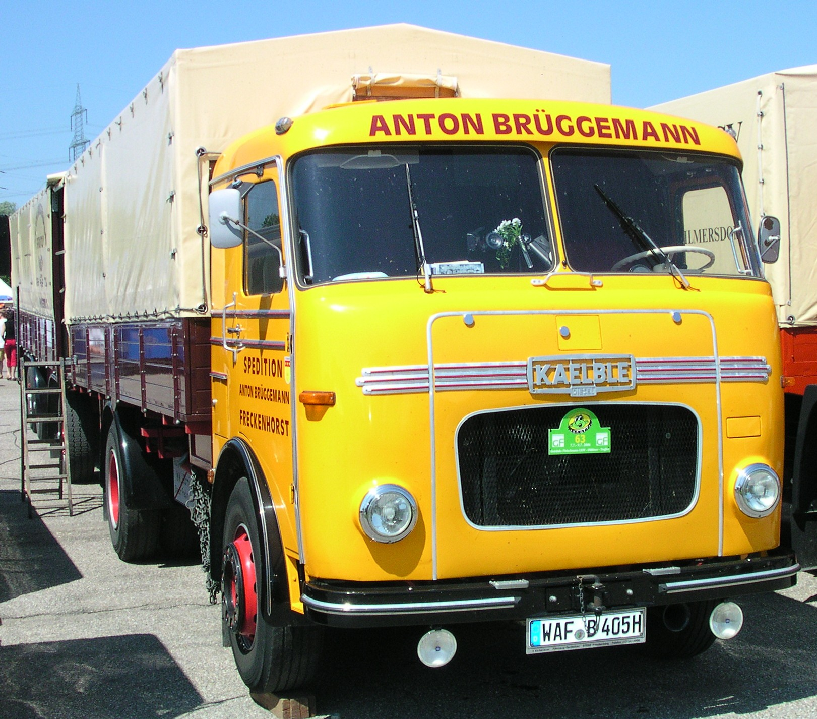 Wörth am Rhein beim Oldtimer-Treffen bei Daimler-Chrysler, Kaelble Frontlenker-Lastzug, K652LF, Baujahr 1963, 195 PS, 90 km/h, ges.Gew. 16000